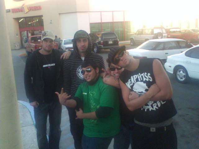 Delux con un fan